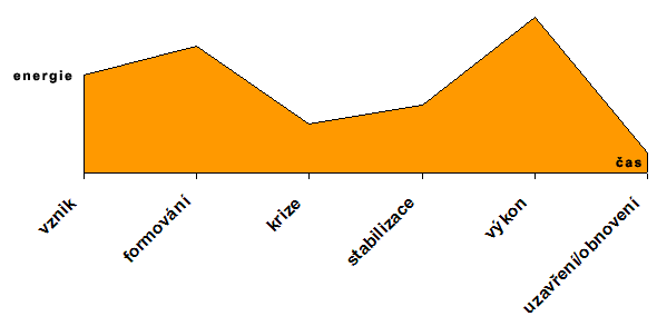 Faze vyvoje skupiny